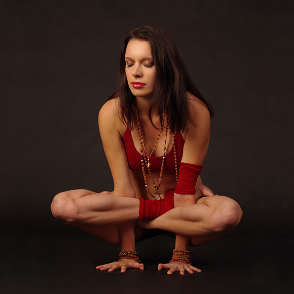 Kukkutasana by Nina Mel, Yoga Teacher